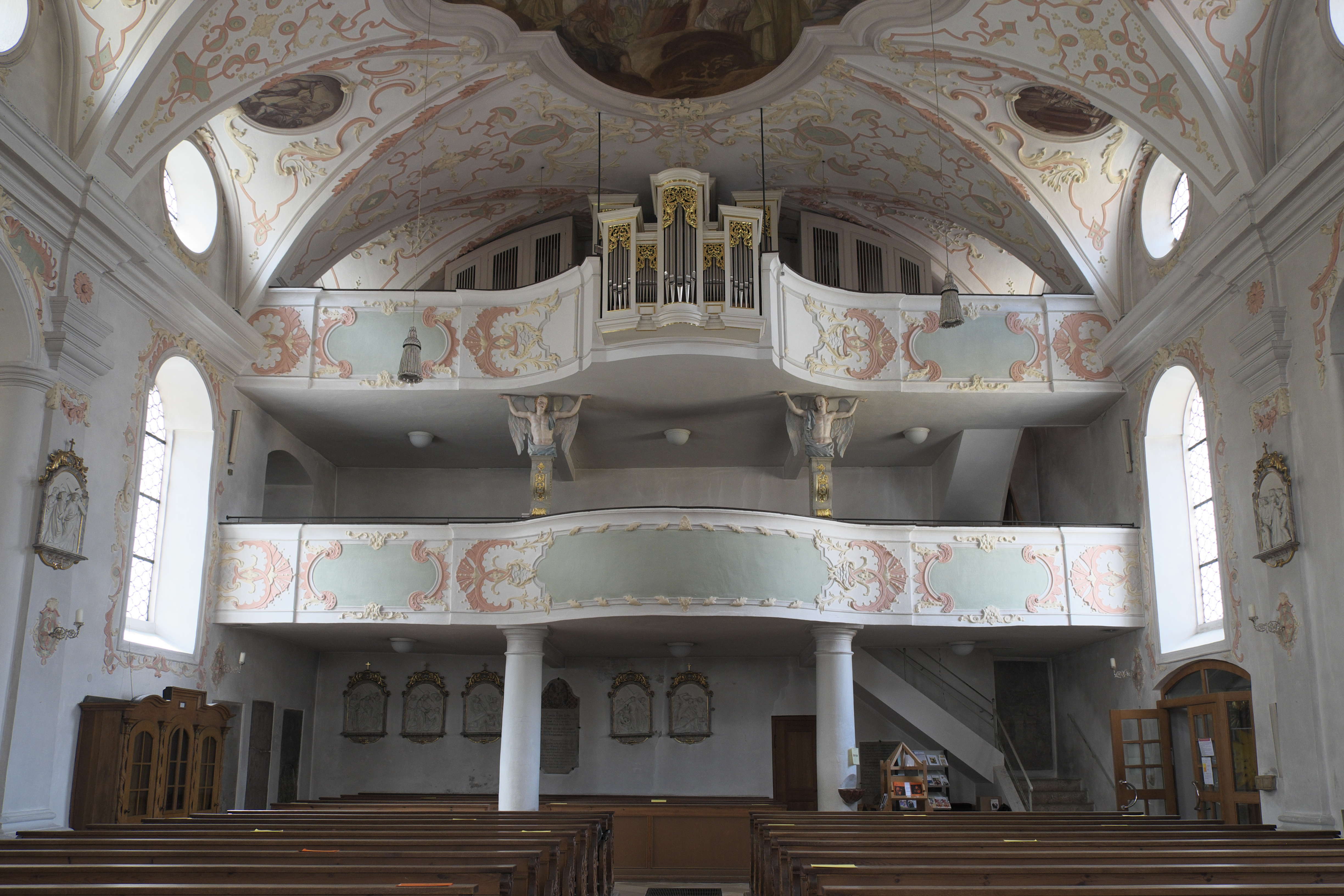 Katholische Pfarrkirche St. Johann Baptist in Riedenburg im niederbayerischen Landkreis Kelheim (Bayern/Deutschland), Doppelempore